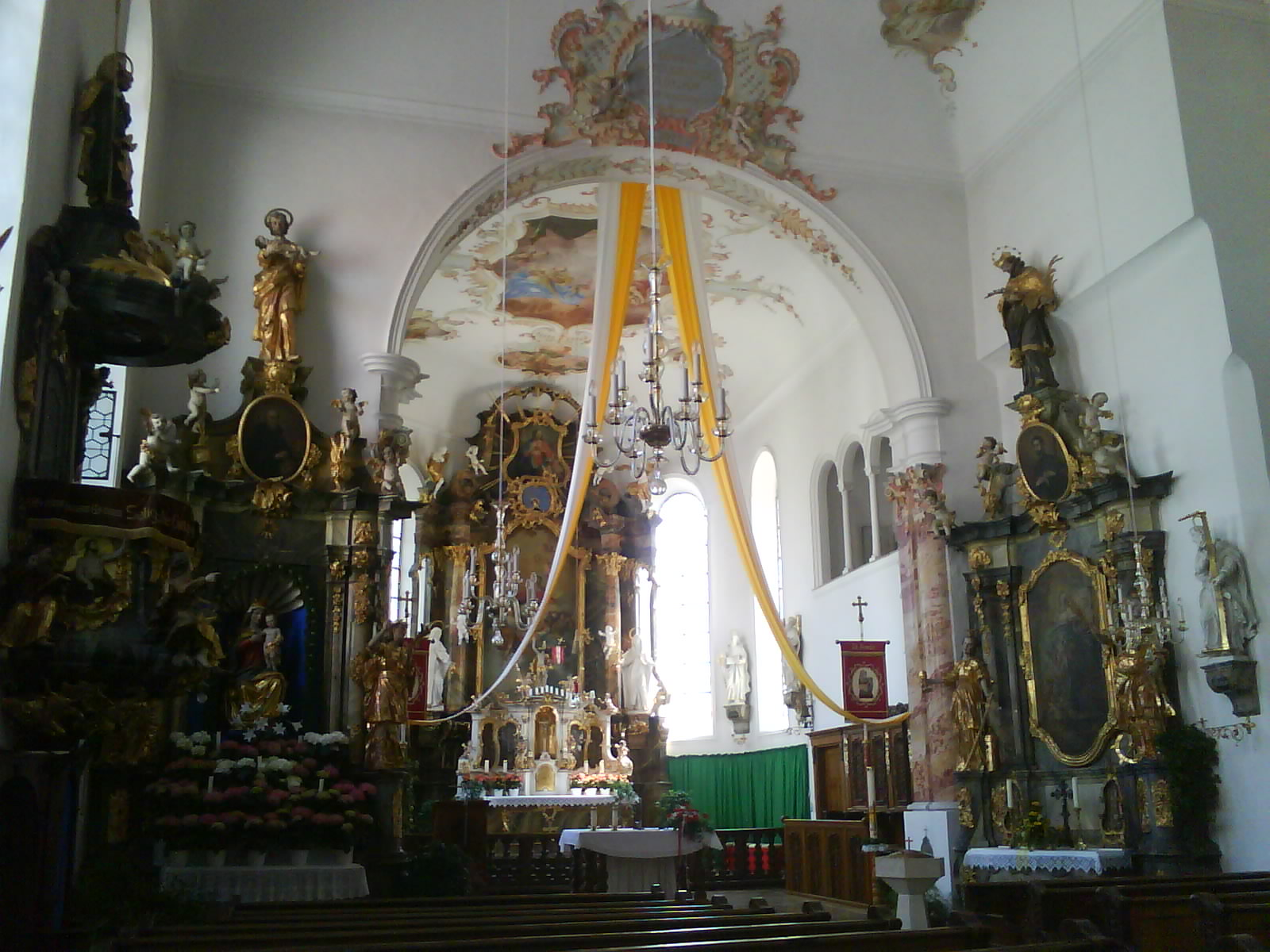 Bayern Schwaben Landkreis Unterallgäu ehemalige Klosterkirche Klosterbeuren nach Osten